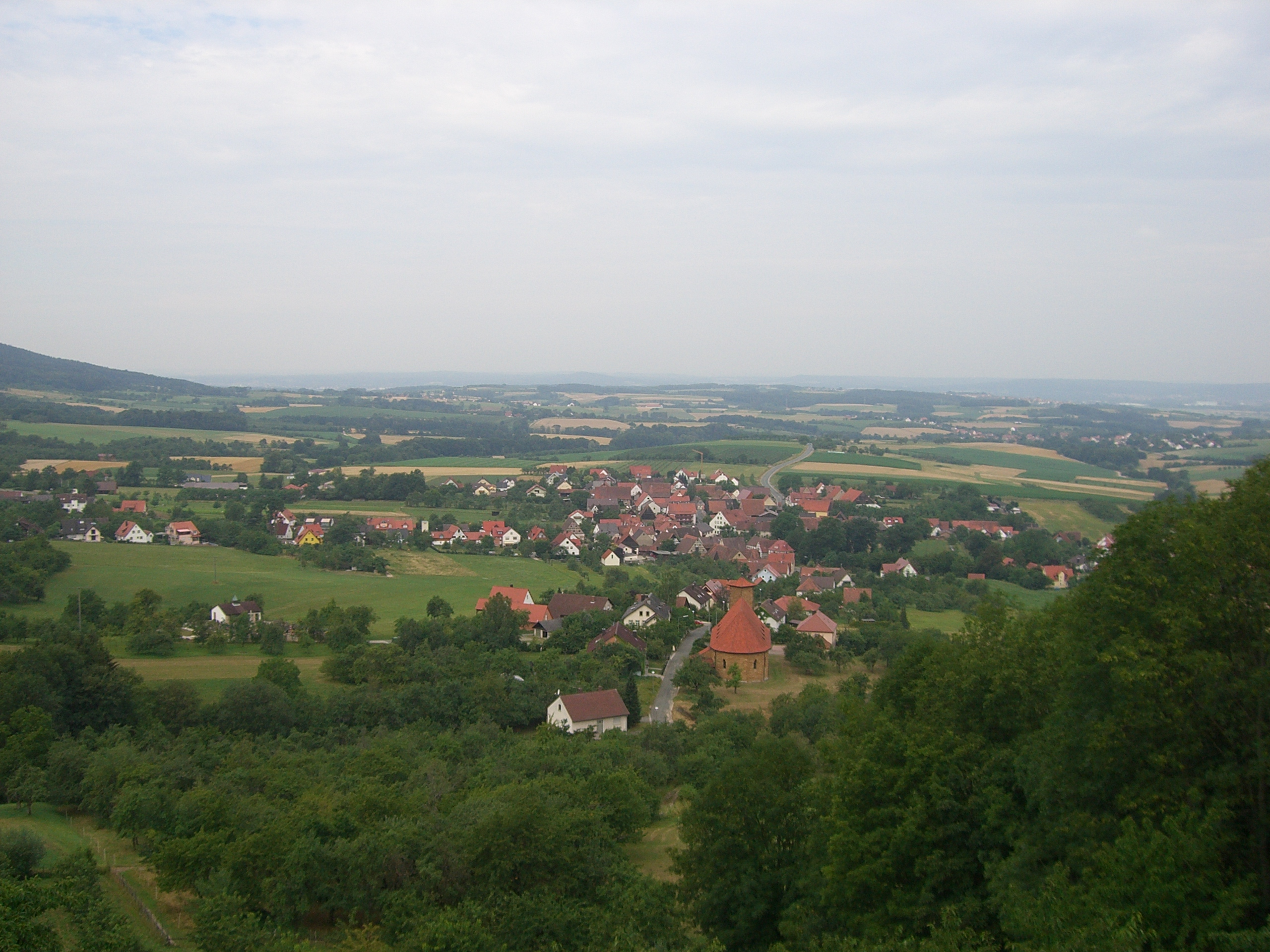 View from Regensberg over Weingarts